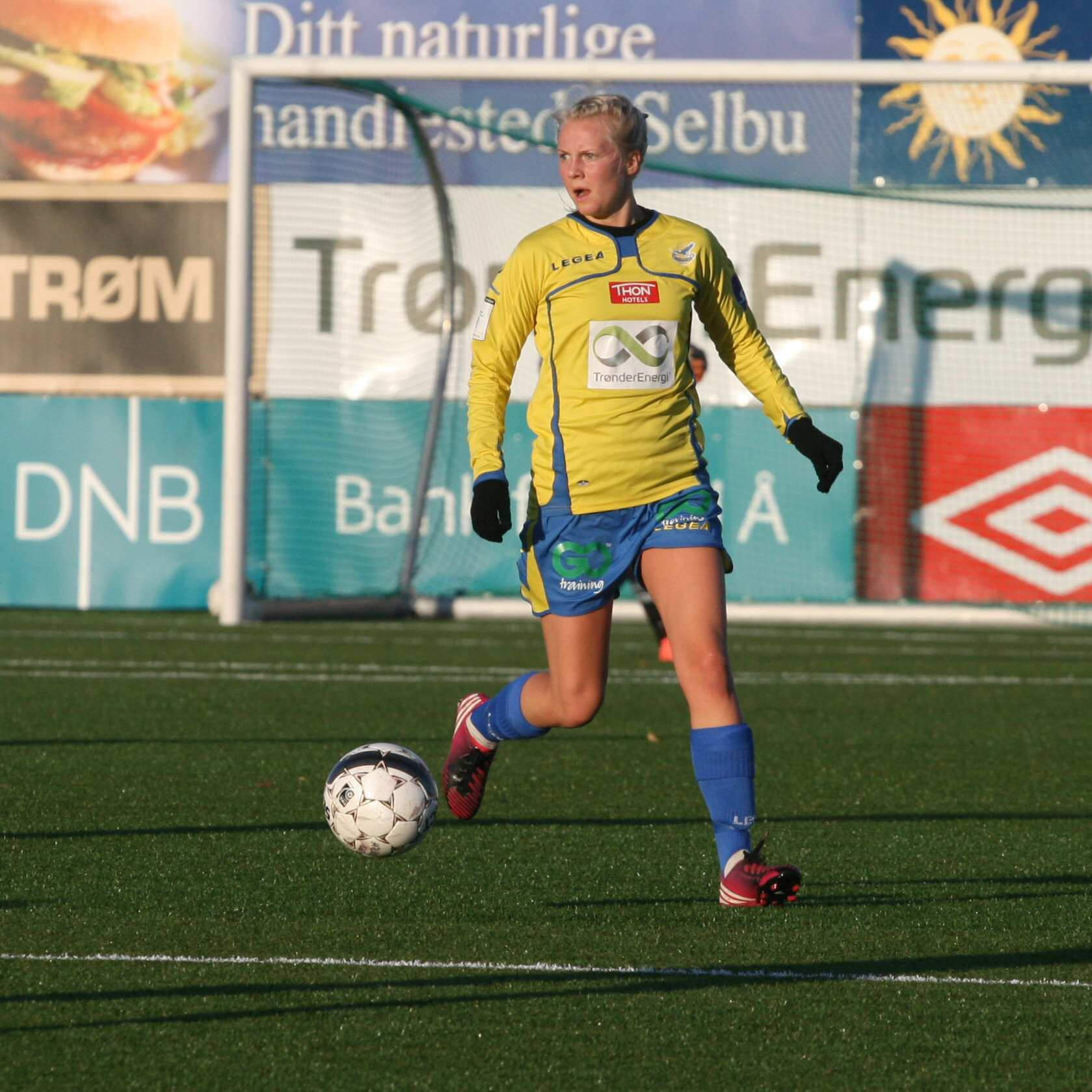 Fotballspilleren Mali Næss